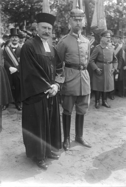 Eine Einwehung des Denkmals (Clayallee 91) des Gardeschützen-Batallions für ihre Gefallenen fand am 19. August im Beisein des Prinzen Oskar v. Preussen statt. Prinz Oskar v. Preussen und Hofprediger Dr. Vogel.